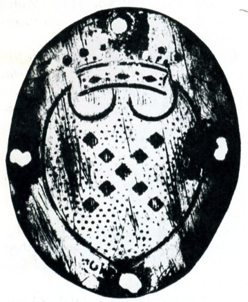 License Karl Drais / Lizenzmarke für die Draisine welche unter dem Patent von 1818 von Karl Drais Lief